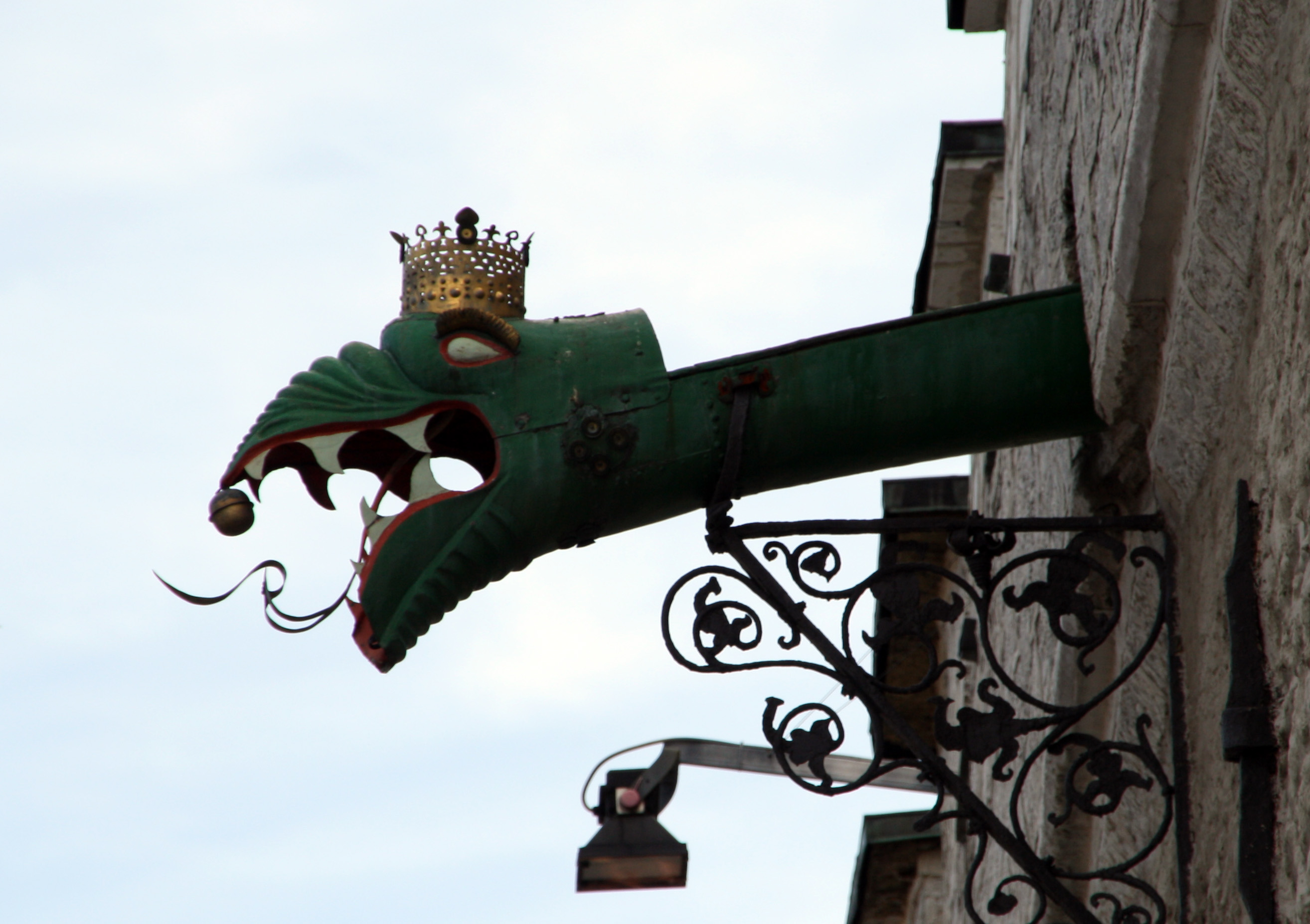 Tallinna raekoja veesüliti.